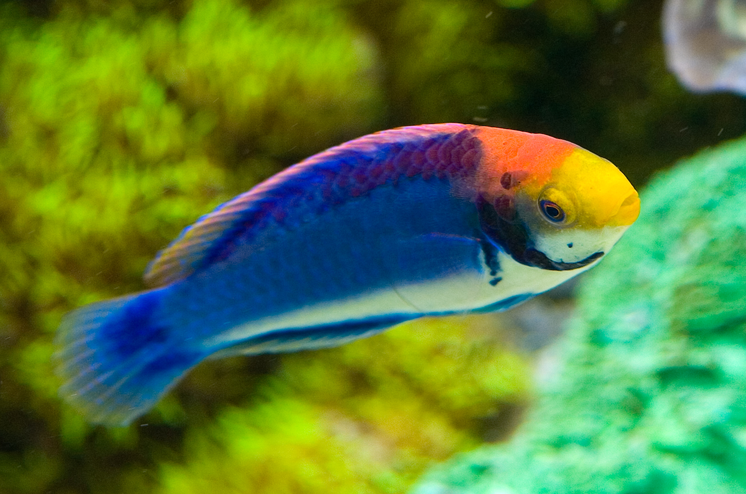 Rotaugen-Zwerglippfisch (Cirrhilabrus solorensis)